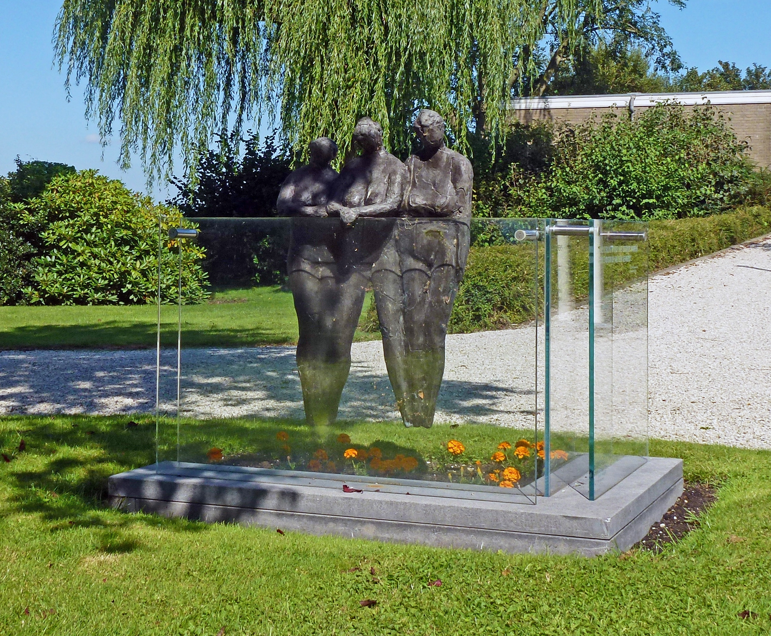 Het monument heeft geen titel maar stelt drie vrouwen voor die wachten op de thuiskomst van hun dierbaren. Het monument is gemaakt door Ineke van Dijk en geplaatst op 29 november 2003. Het bevindt zich op de Algemene - of Nieuwe Begraafplaats, Achterweg 2 in Ammerstol. Tekst op het monument: De oorlog wordt niet door de wapens doch door de mensen gevoerd. Uitspraak van Ds. J. B. Th. Hugenholtz, Ammerstol 1935 en de namen Arie Matthijs de Jong 8-3-1921 / 30-11-1943 en Jan Ooms 7-10-1920 / 21-10-1943. Ammerstol hoort bij de gemeente Bergambacht.